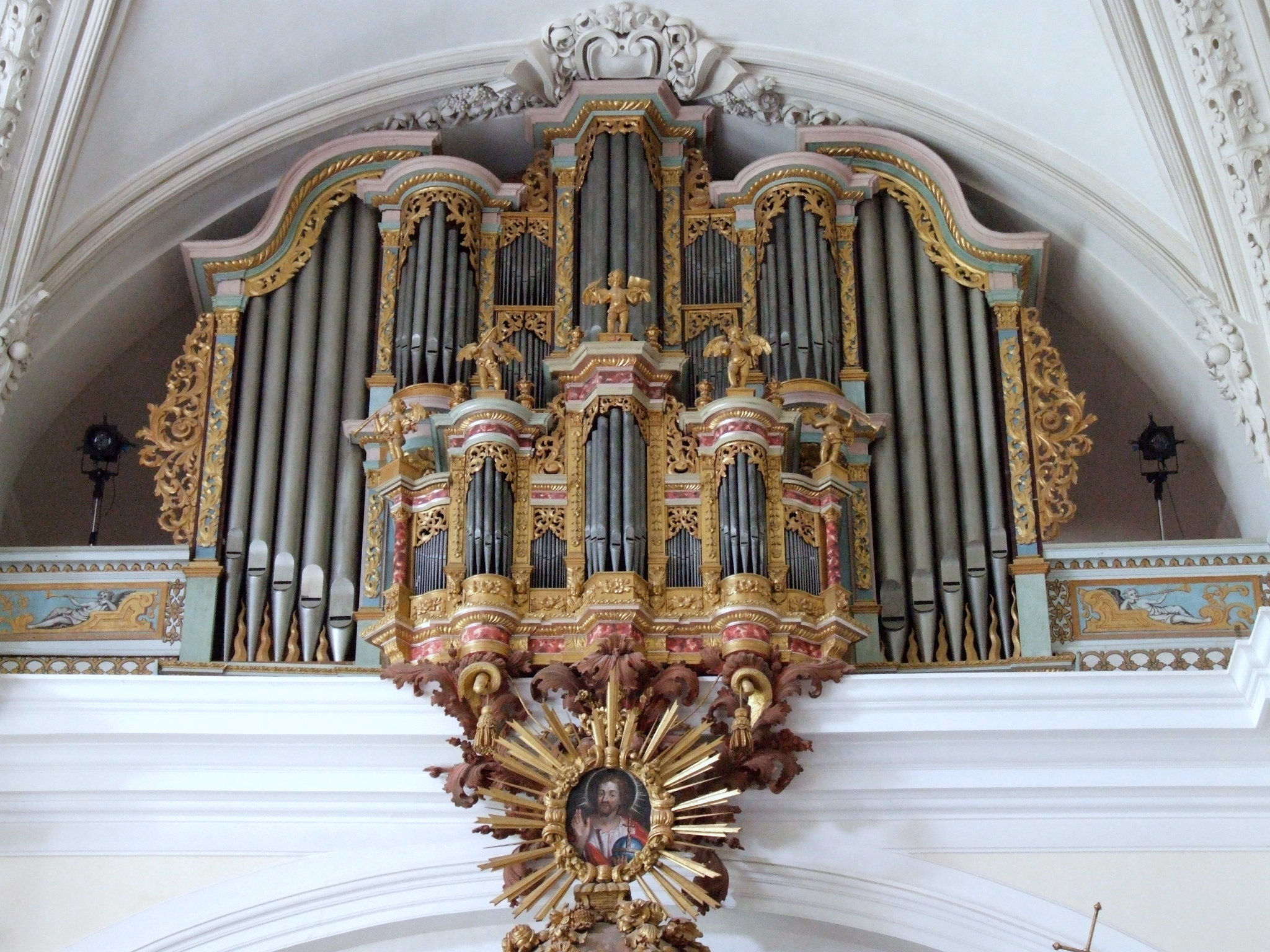 Orgel im Weilburger Schloss